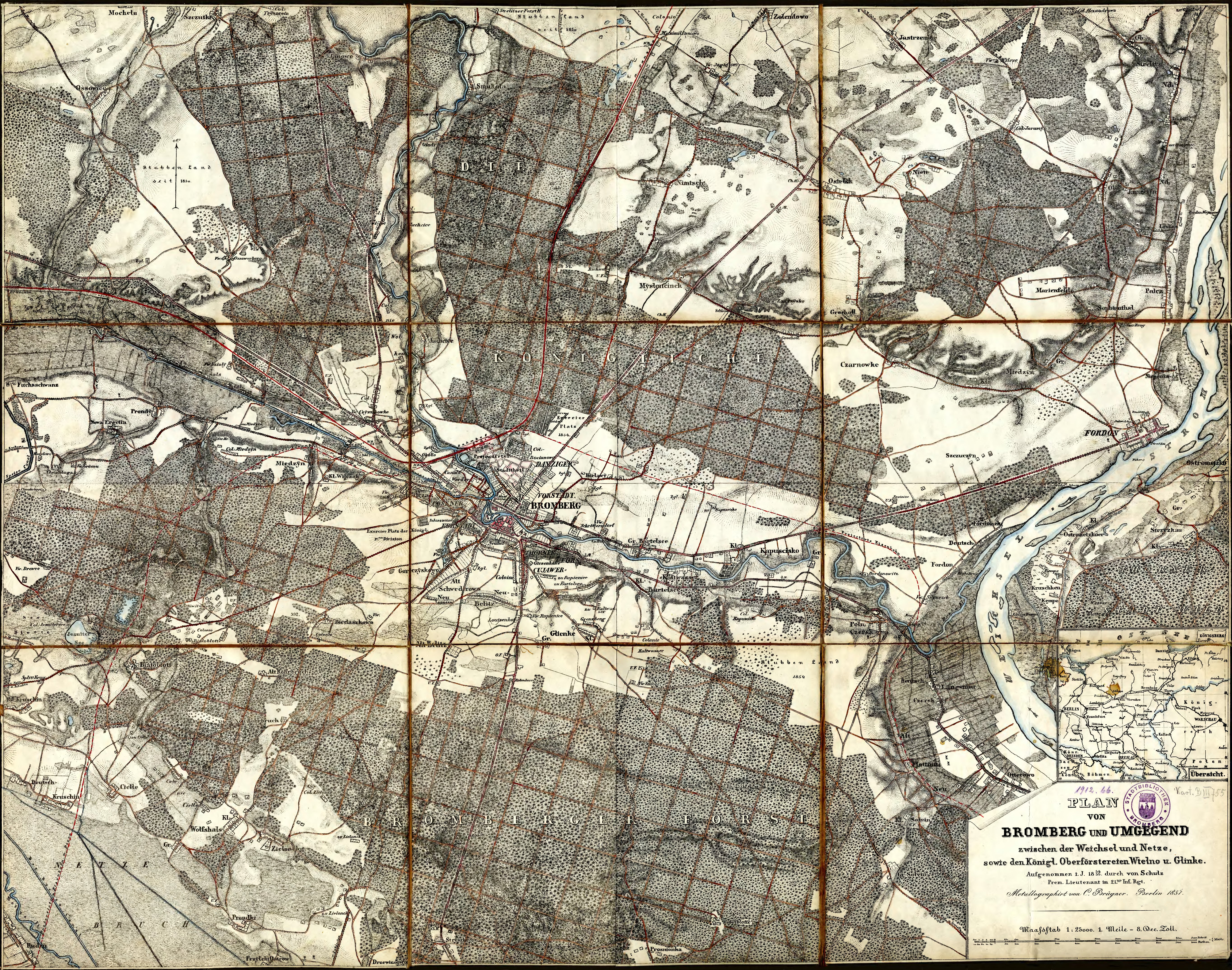 Plan von Bromberg und Umgegend zwisechen der Weichsel und Netze, sowie den Königl. Oberförstereien Wtelno u. Glinke